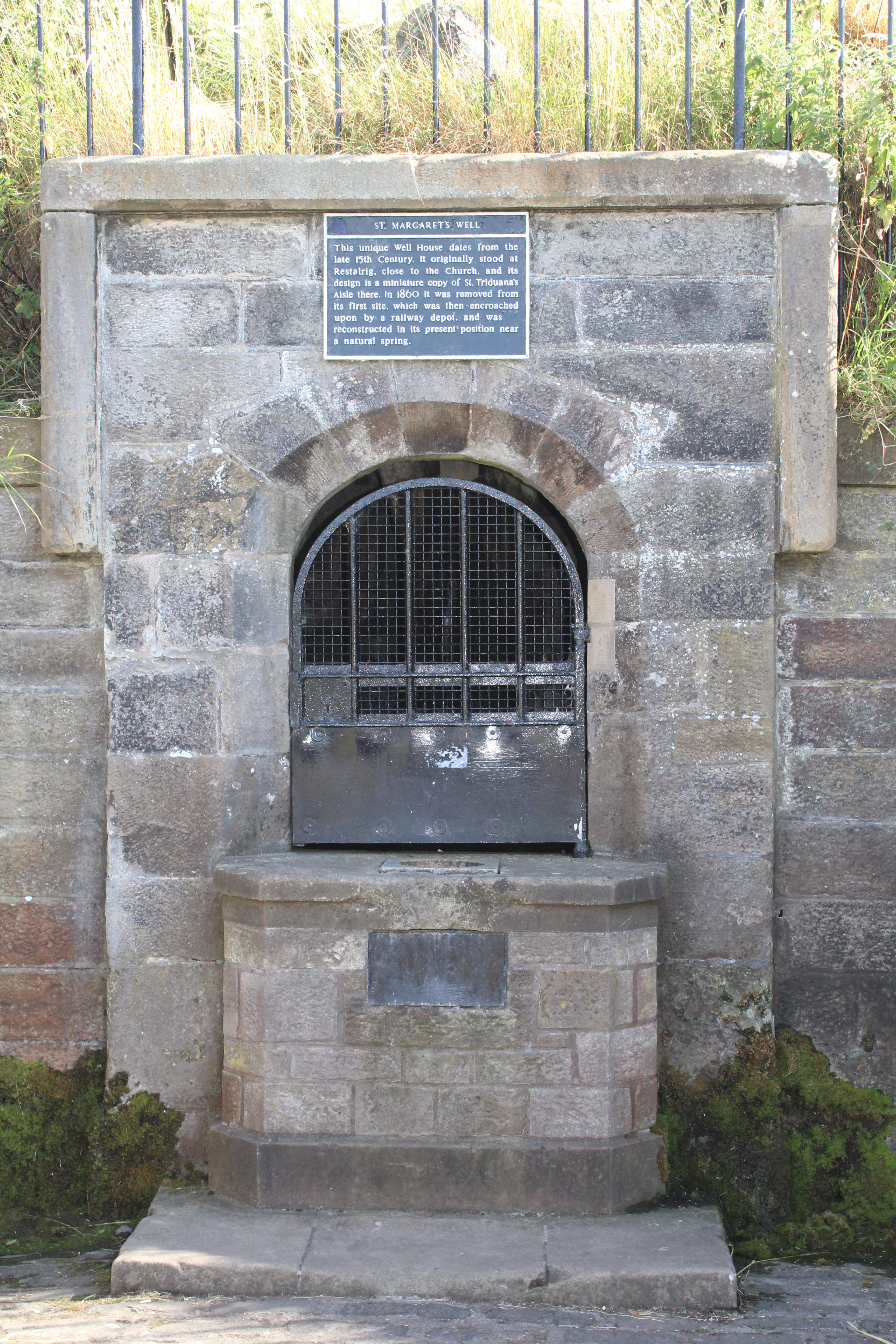 Puits Sainte-Margaret, Édimbourg.